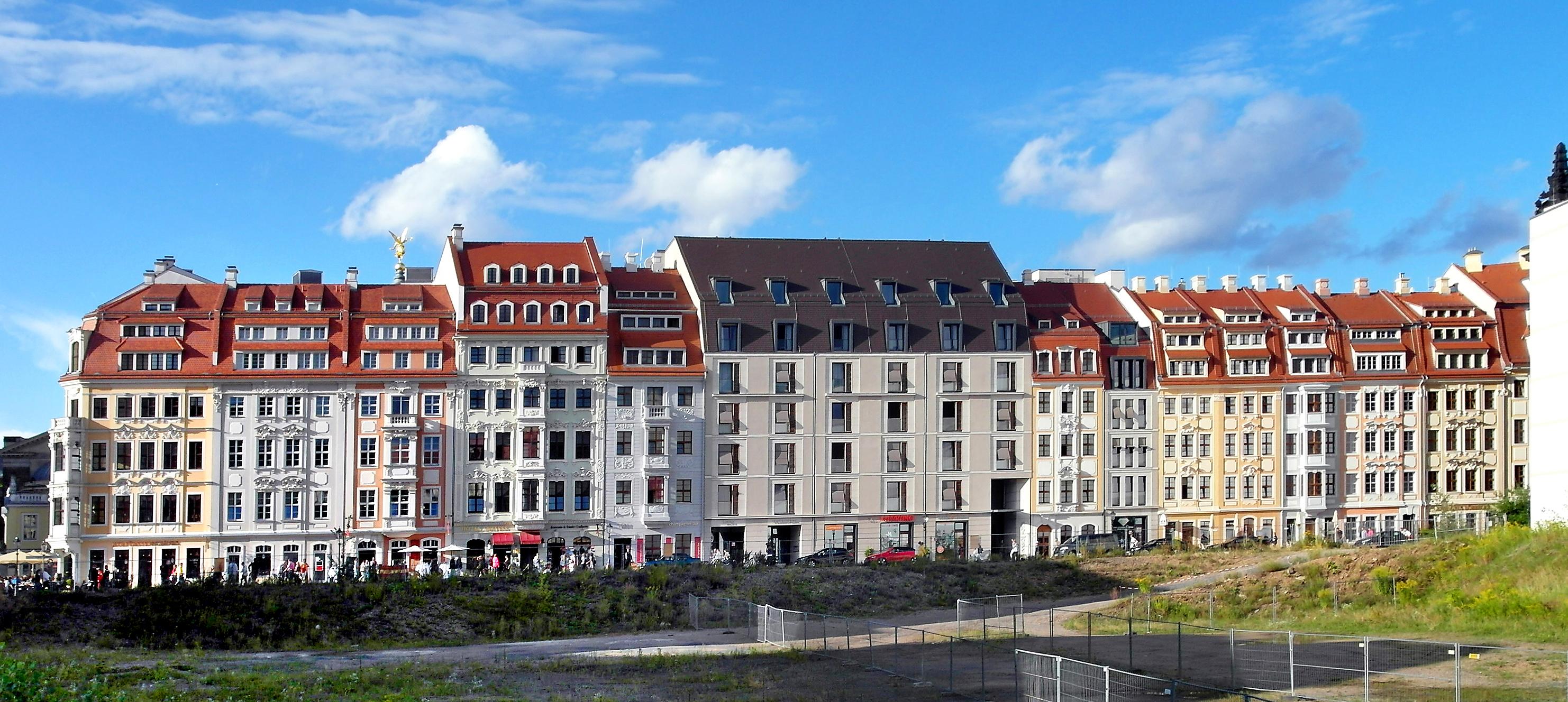 16.08.2014 Dresden Neumarktgebiet: Straßenzug: Rampische Straße 1, 3, 5 (GMP: 51.051603,13.742656), ... 31. [SAM5439.JPG]20140816100DR. JPG(c)Blobelt